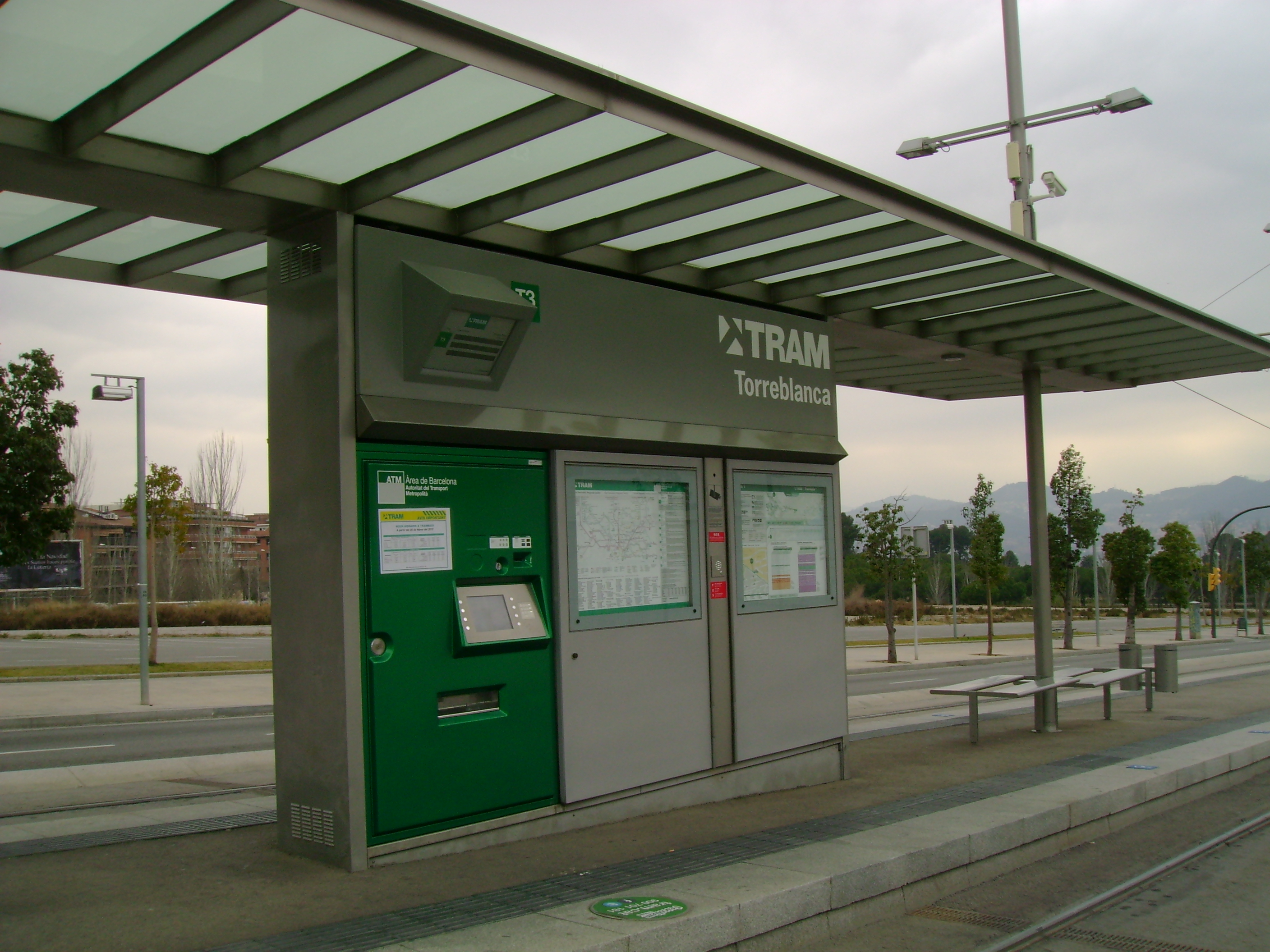 Foto capturada per la meva càmara a l'estació de Torreblanca (Trambaix).